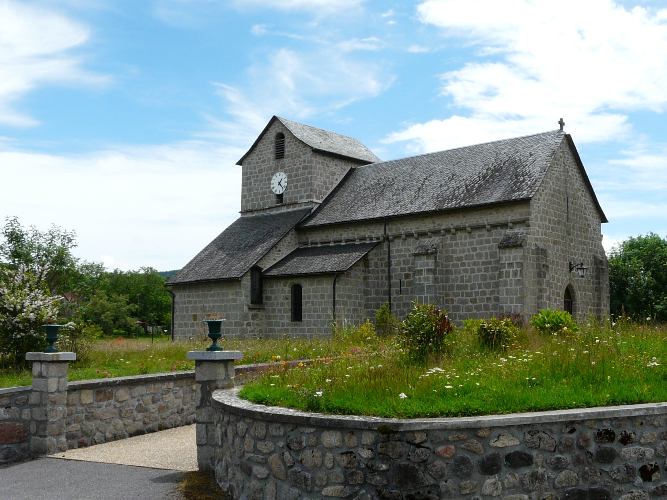 L'église de Sarroux, Corrèze, France.